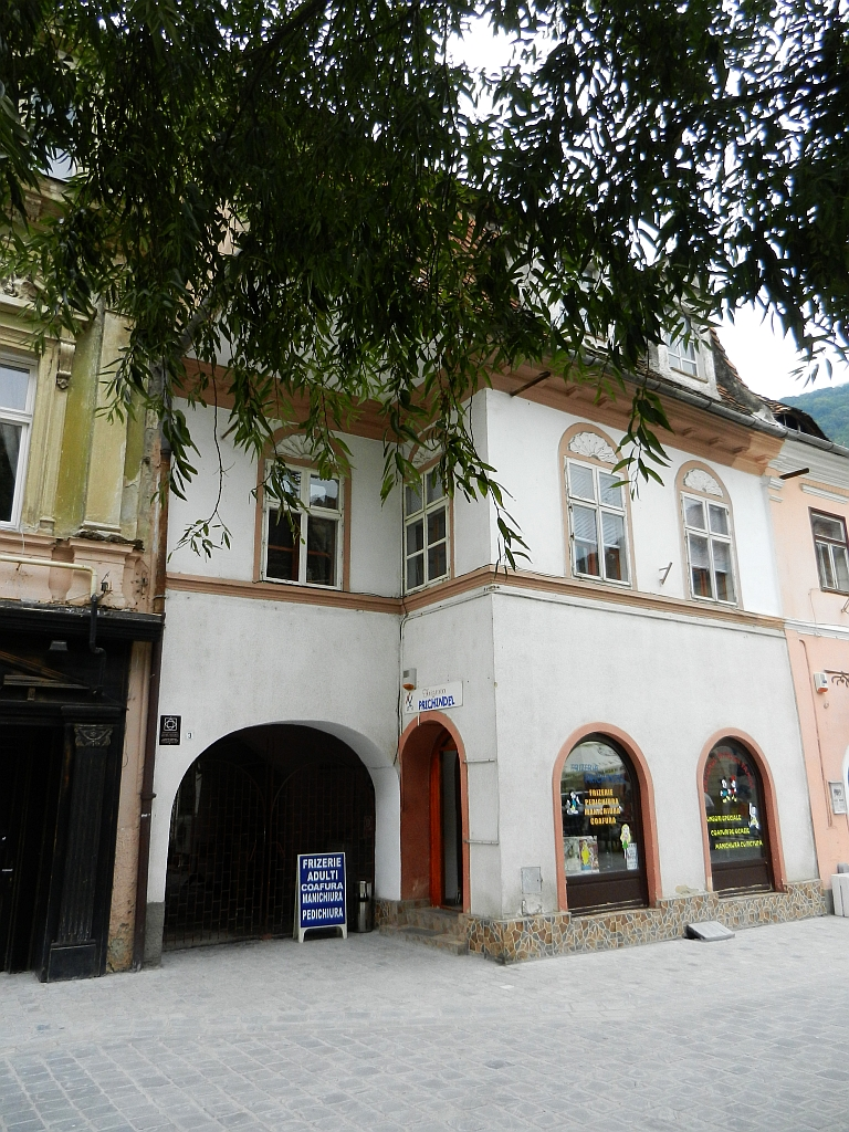 Casa de editură Ciurcu